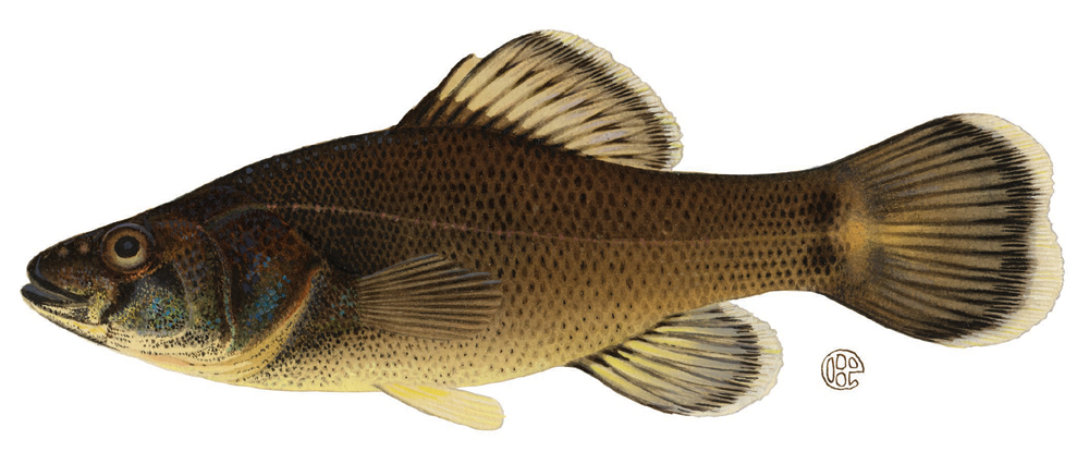 Pirate Perch (Aphredoderus sayanus sayanus)